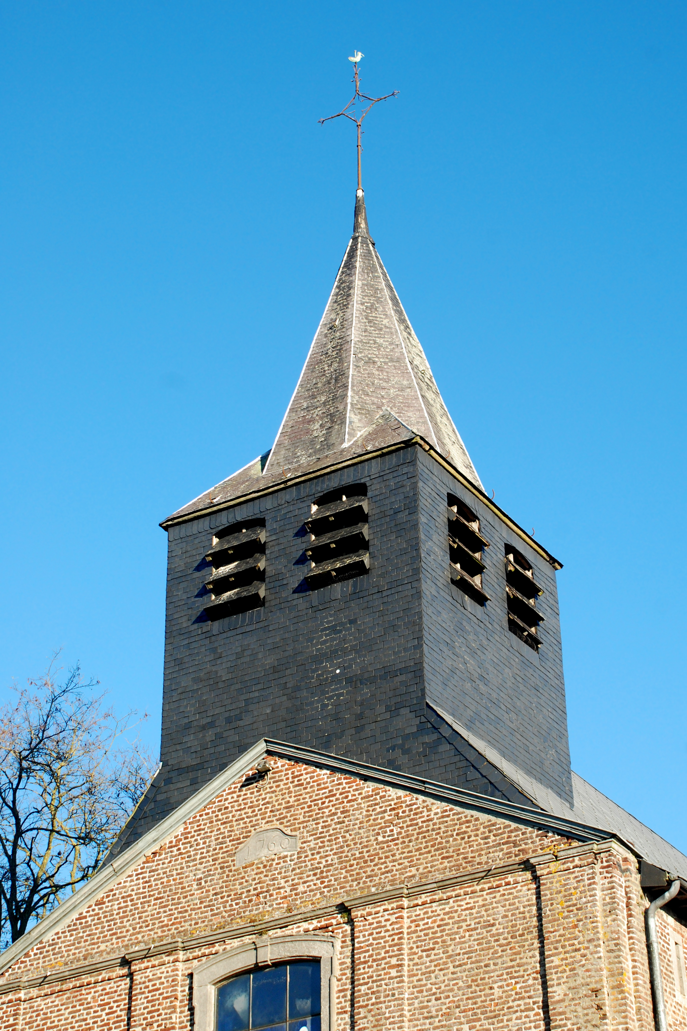 Belgique - Brabant wallon - Genappe - Glabais - Église Saint-Pierre